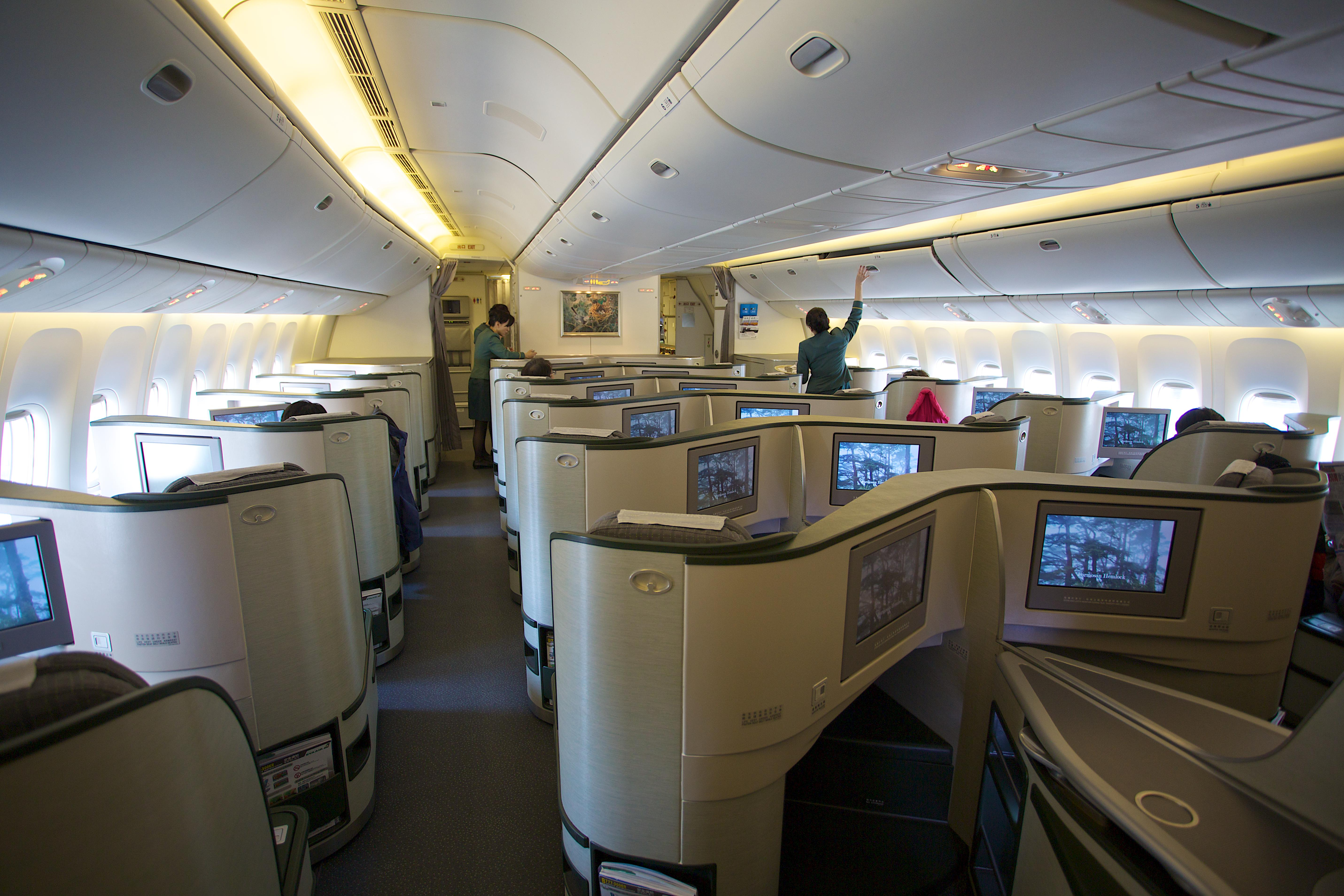 BR 852 | 777-35E | EVA AIR | Royal Laurel Class